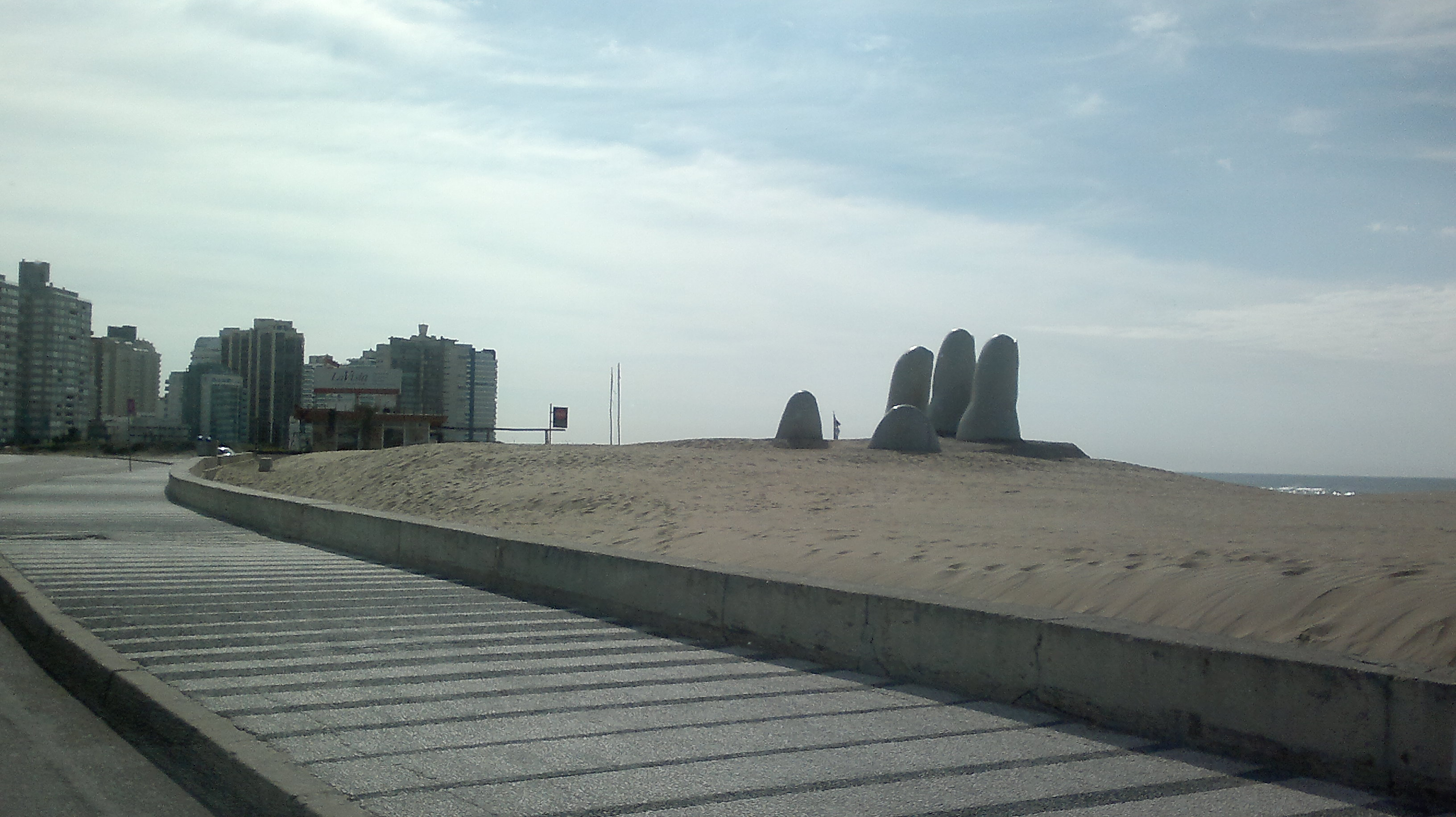 El Monumento al Ahogado ó Hombre emergiendo a la vida es una escultura de cinco dedos parcialmente sumergidos en arena. Ubicada en la Playa Brava de Punta del Este, Uruguay. Socialmente se lo conoce como el monumento a "Los Dedos". Se convirtió en símbolo para Punta del Este desde 1982, transformándose en uno de los puntos de referencia más típicos de nuestra ciudad.